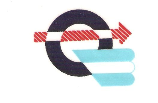 logo antiguo chevallier